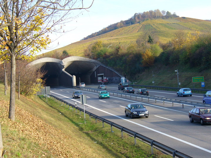 Fellbach, Kappelbergtunnel der B14, Westeinfahrt mit Kappelberg im Hintergrund (Landschaftsschutzgebiet „Kappelberg, Kernen, Haldenbach-, Strümpfelbach- und Beutelsbachtal mit angrenzenden Höhen“)